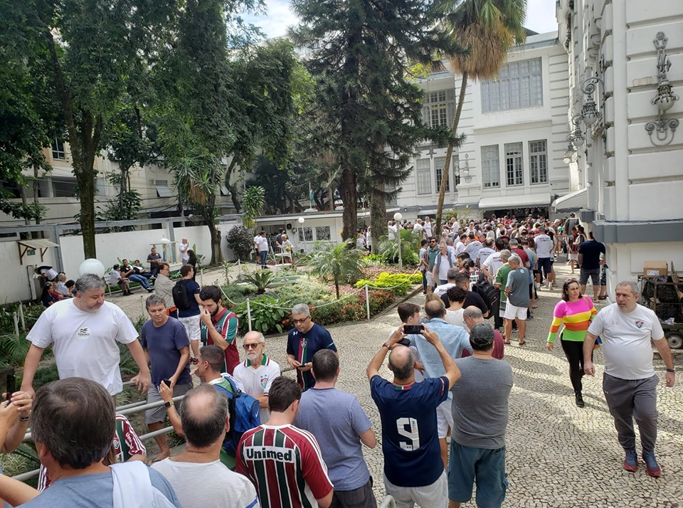 Fila para votação na eleição para presidente do Fluminense Fotbal Club em 2019 no interior do clube.